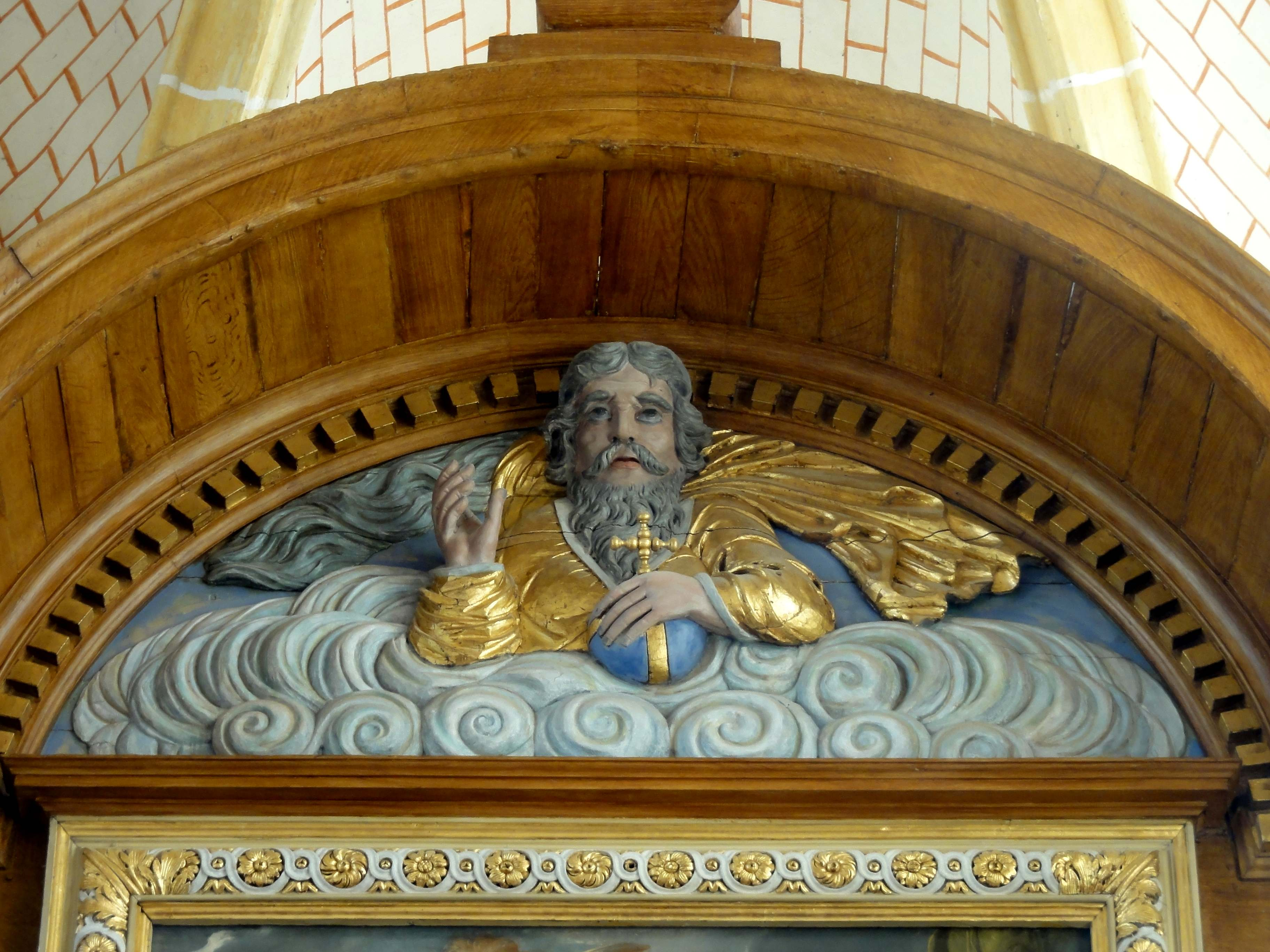 Mobilier de l'église (voir titre).